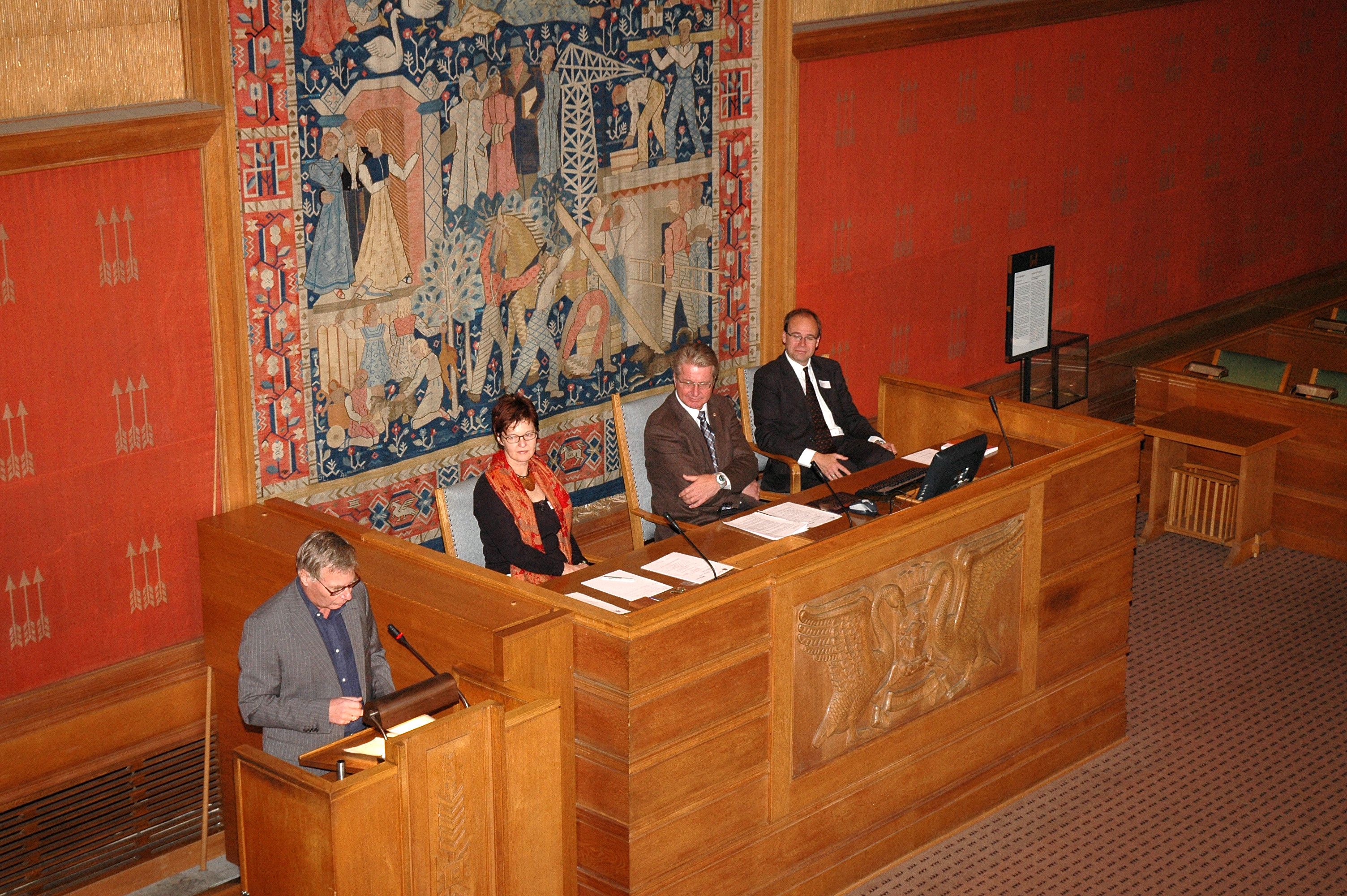 Fra bystyresalen i Oslo rådhus. Ordførerpodium og talestol. Fra venstre; Rune Gerhardsen, varaordfører Aud Kvalbein, ordfører Fabian Stang, direktør for Bystyrets sekretariat Jan Frode Jacobsen